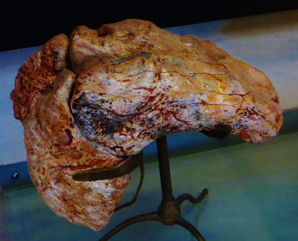 Fossil of Ancylotherium, an extinct mammal - Took the photo at Museum Histoire Naturelle, Paris